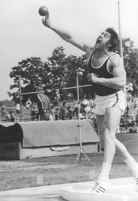 Hans-Peter Gies ADN-ZB Mittelstädt 10.06.1972 Potsdam: Leichtathletik-Länderkampf DDR - Bulgarien (1.Tag) -Mit der ausgezeichneten Weite von 21,27 m gewann der Berliner Dynamo-Sportler Hans-Peter Gies (Foto vom DVfL-Pokalwettbewerb am 03.06.1972 in Potsdam) das Kugelstoßen der Männer. Damit verfehlte er den Europarekord nur um 5 cm.